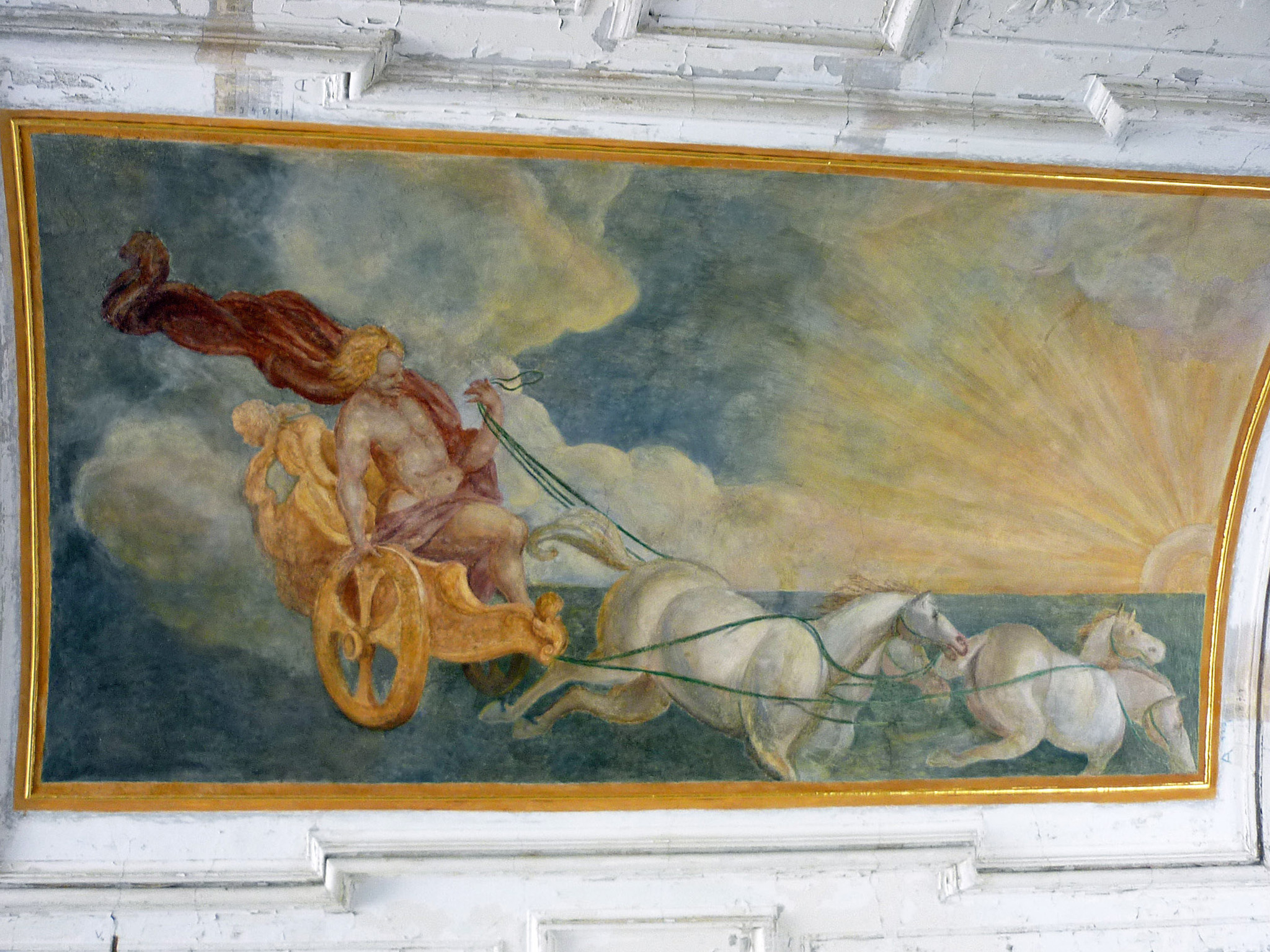 Schloss Rothenhaus bei Görkau in Nordböhmen (Červený Hrádek), Deckenbild in der Einfahrt zum Schloss: Sturz des Phaeton